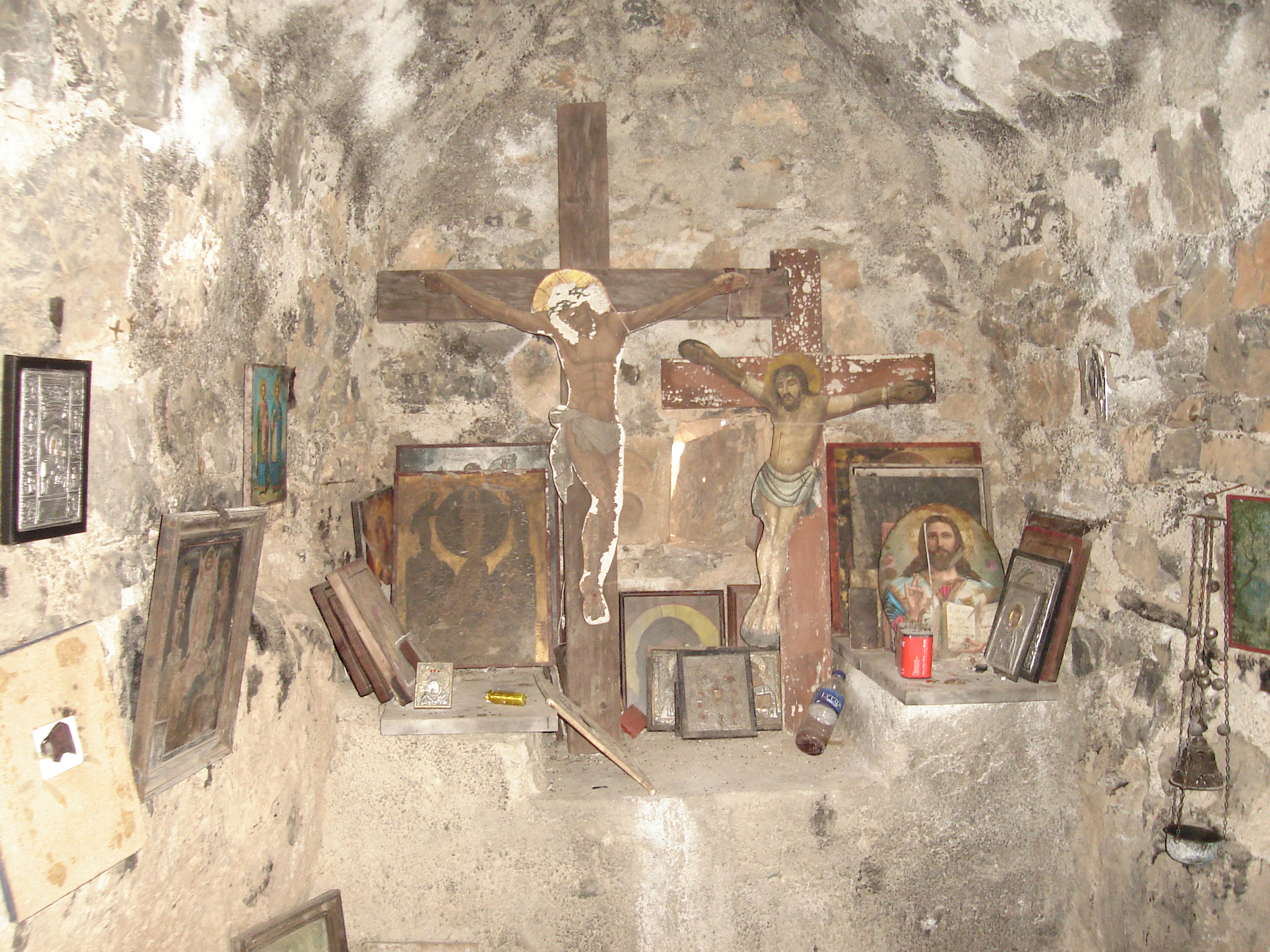 το ιερό του Αφέντη Χριστού στα Αμιρα